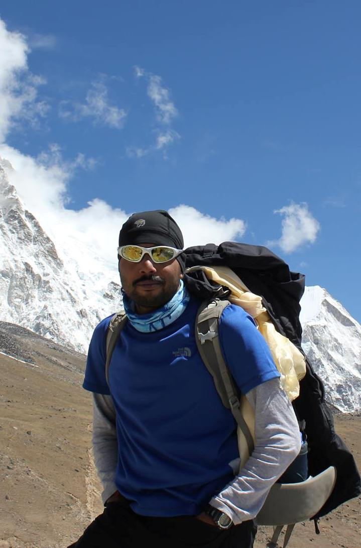 ഉണ്ണിക്കണ്ണൻ എ.പി. വീട്ടിൽ